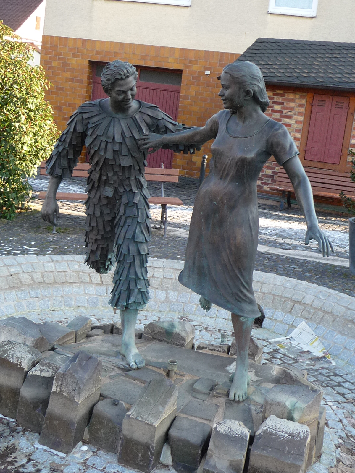 Forst an der Weinstraße